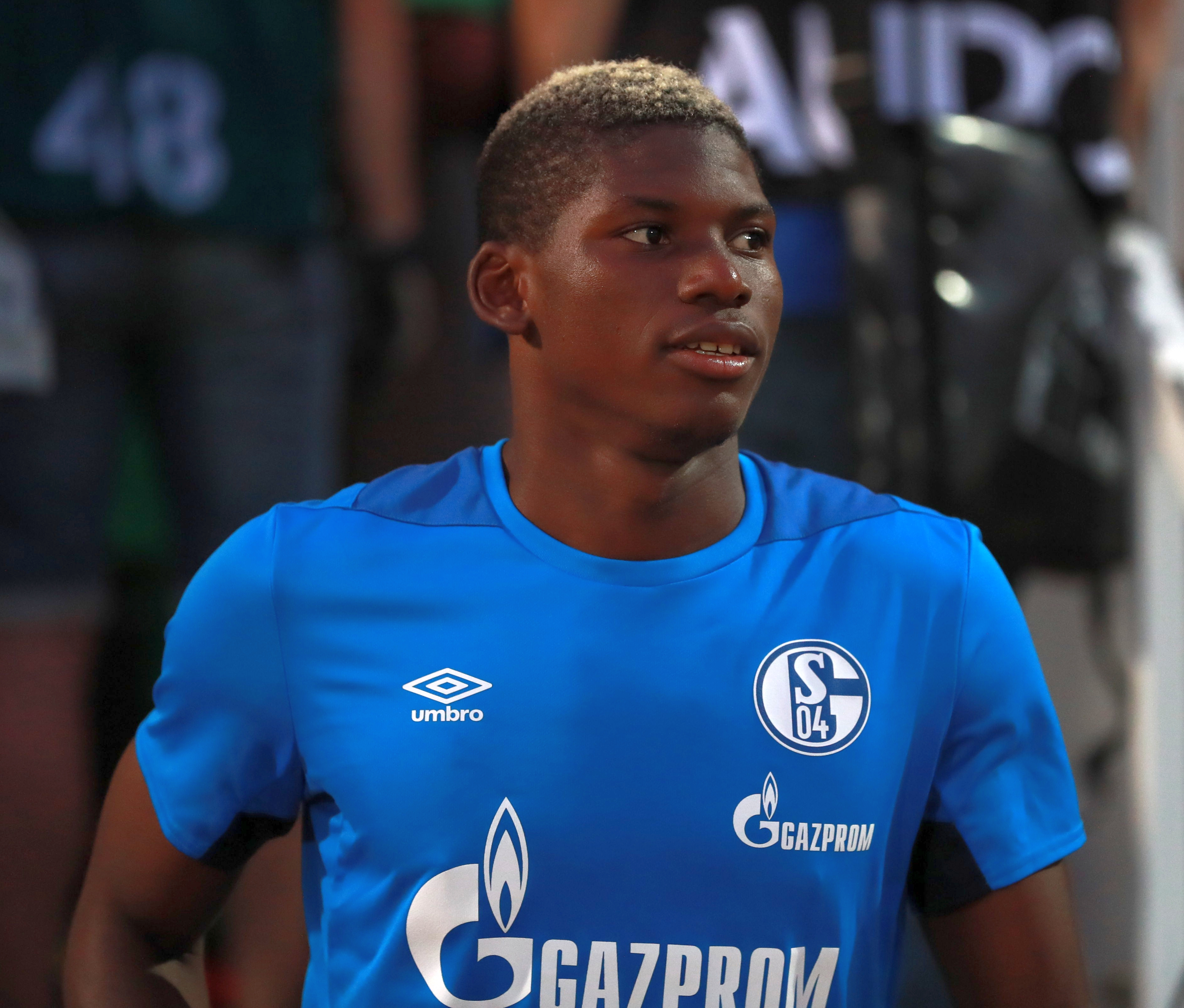 DFB-Pokal 2018/19, 1. Hauptrunde: 1. FC Schweinfurt 05 gegen FC Schalke 04 0:2 (0:1)